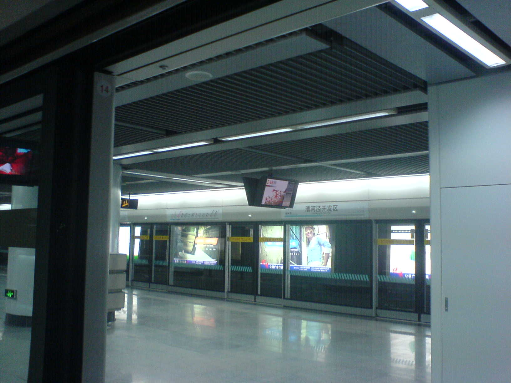 漕河泾开发区站站台